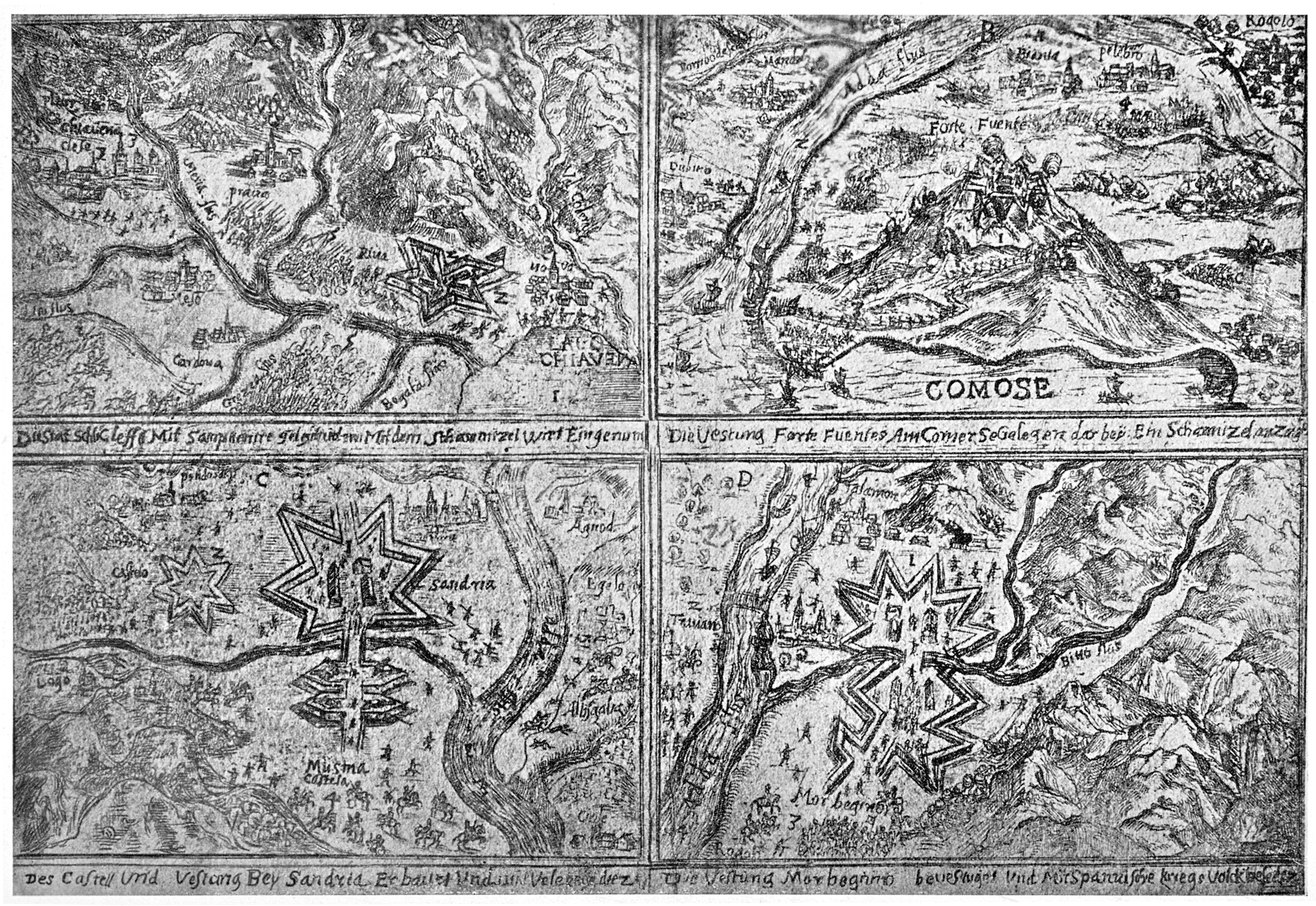 Skizzen zu den Feldzügen der Bündner unter Herzog Rohan im Veltlin 1635. Bild 1: Einnahme der Stadt Chiavenna mit den zugehörigen Schanzen. Bild 2: Die Festung Forte de Fuentes am Comer See. Bild 3: Kastell und Festung bei Sondrio. Bild 4:Die Festung Morbegno.